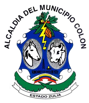 Escudo del municipio Colón, estado Zulia, Venezuela